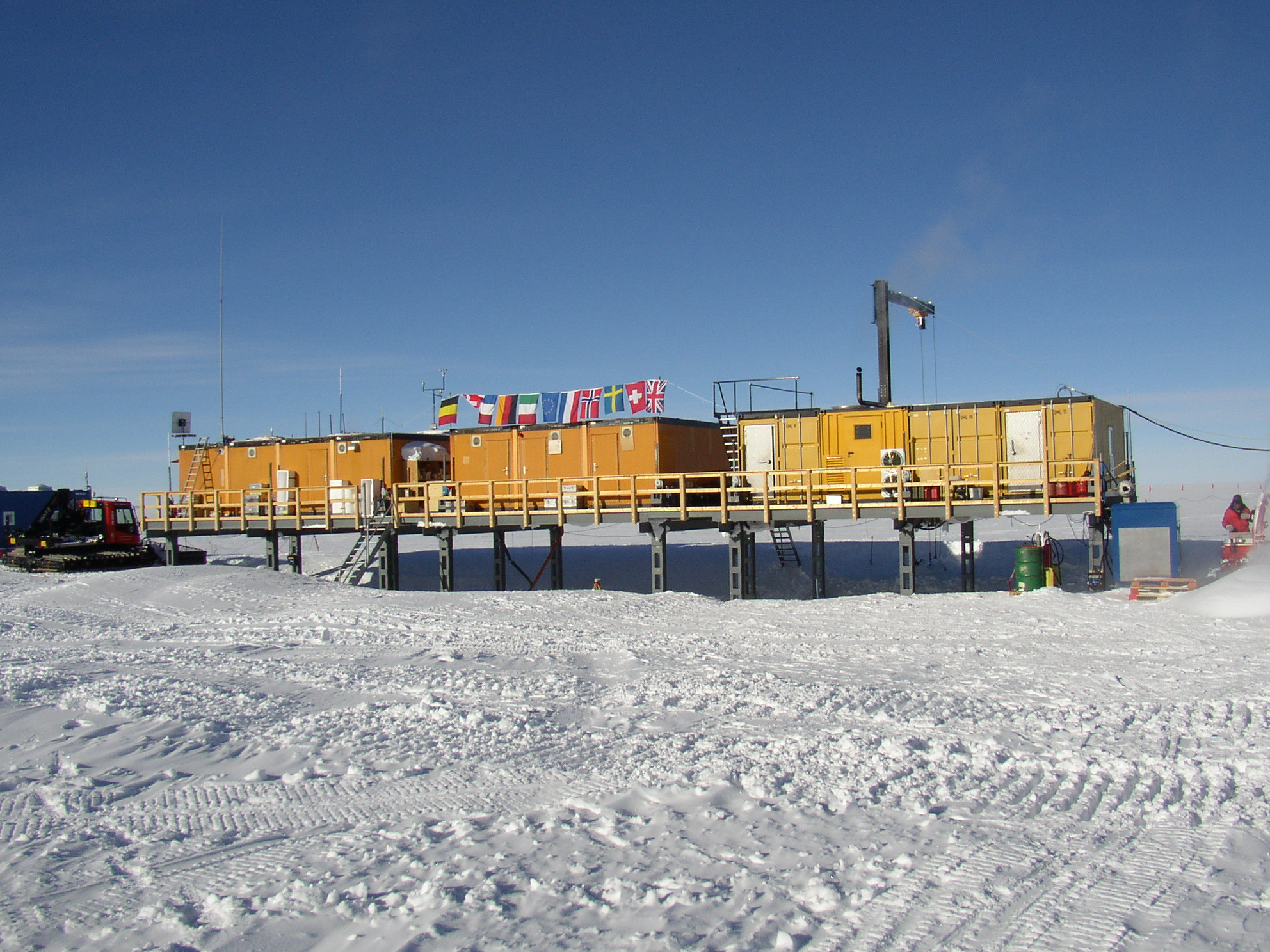 Blick auf die Kohnenstation, Dronning Maud Land, Ostantarktika, 75Sued 0 Ost